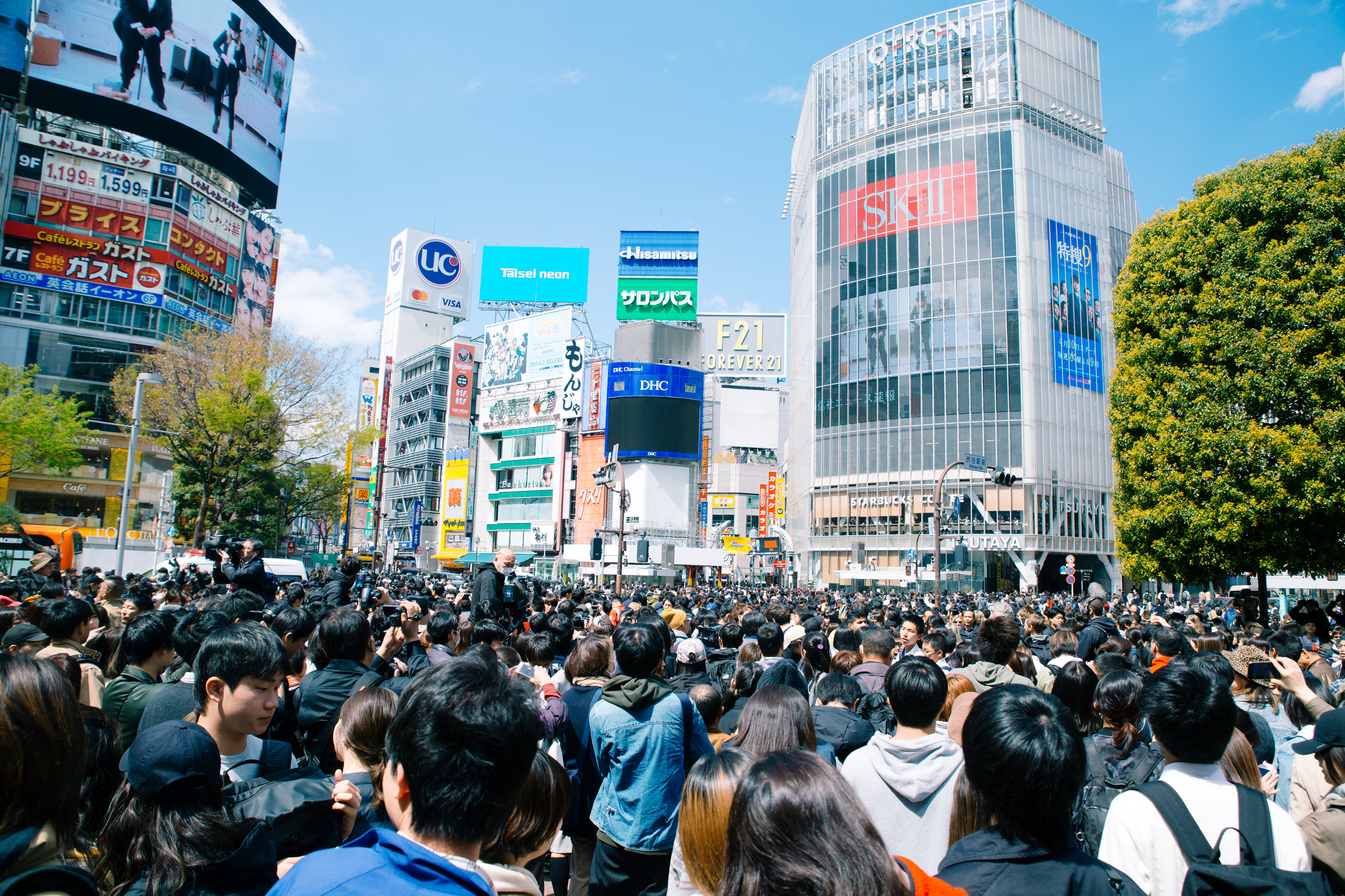 新元号 令和 発表 渋谷駅